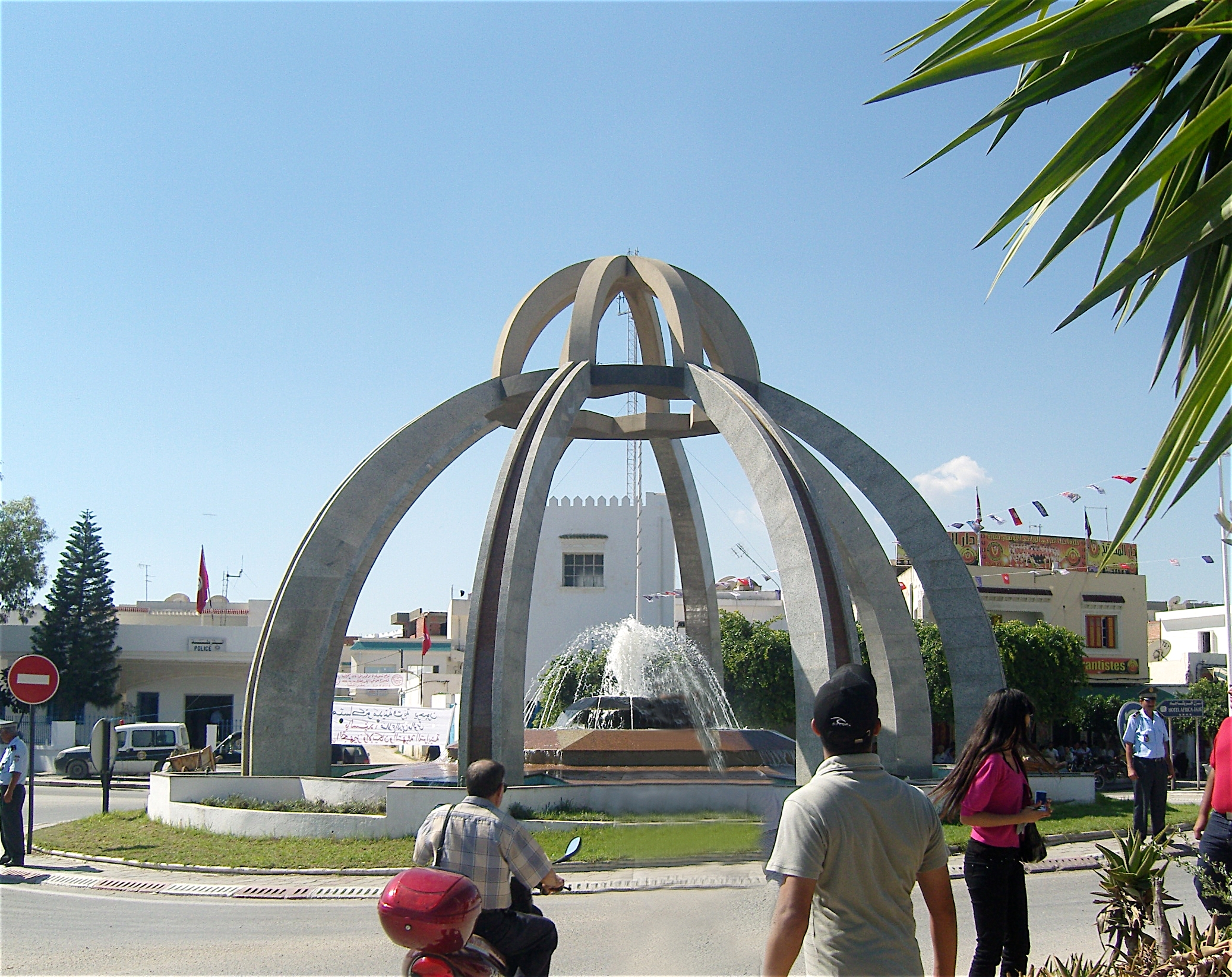 Monument au centre ville de Korba - Tunisie